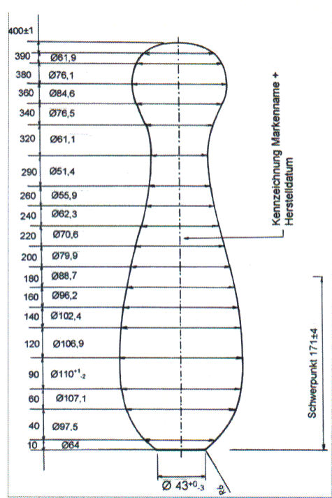 Maße eines Kegel